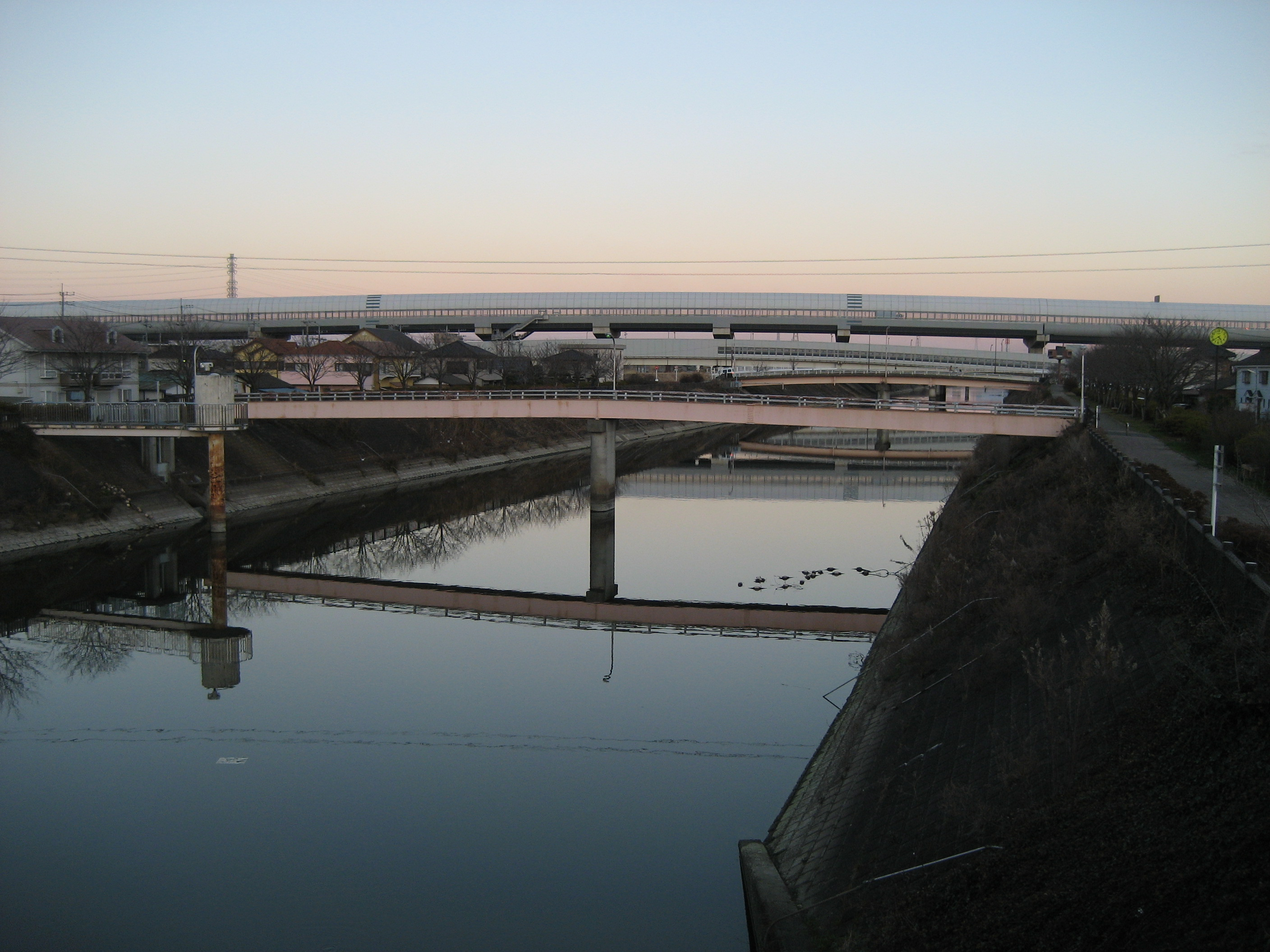 三郷放水路三郷水門から江戸川方面を撮影